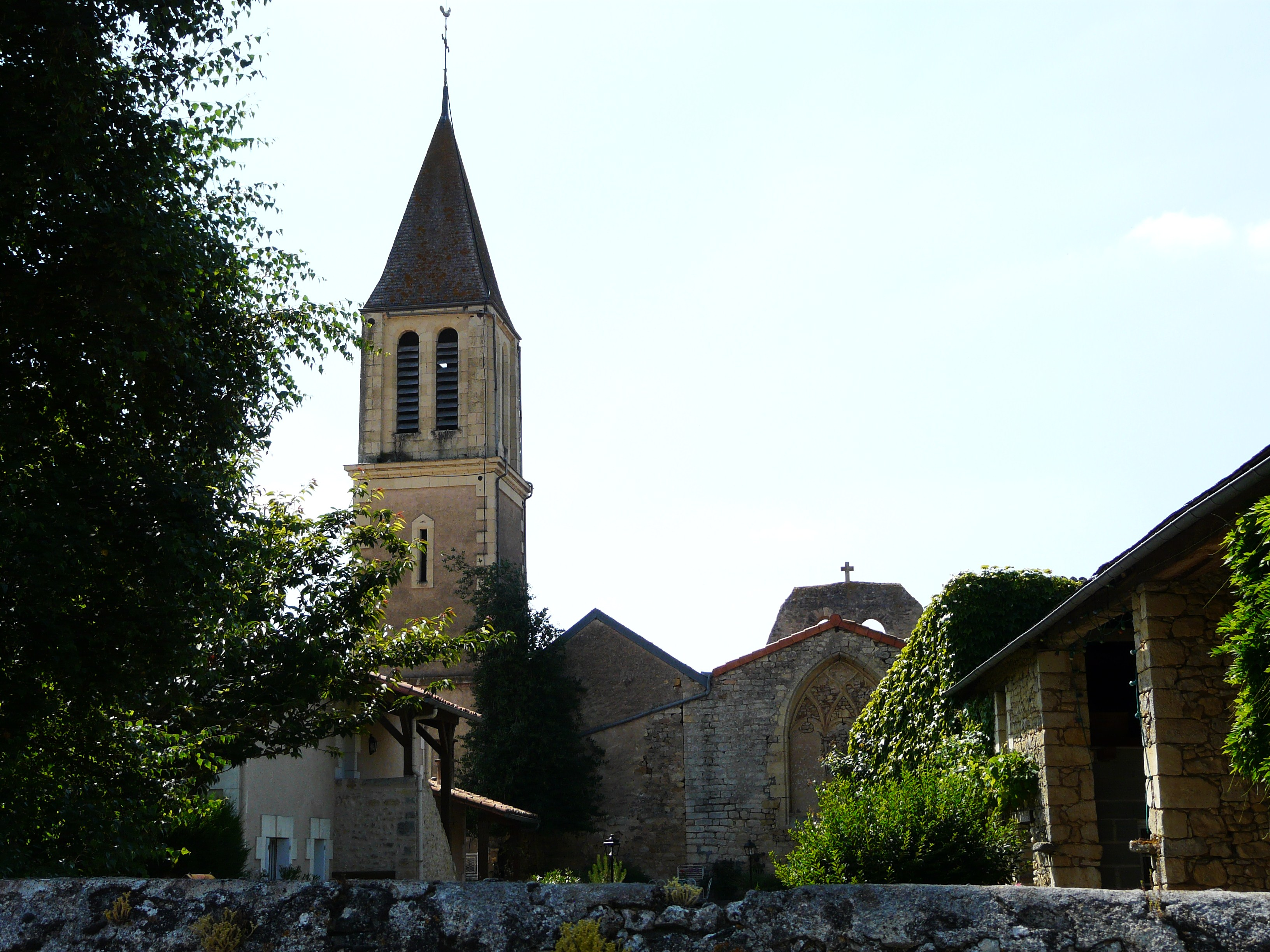 L'église Saint Pierre de Missé